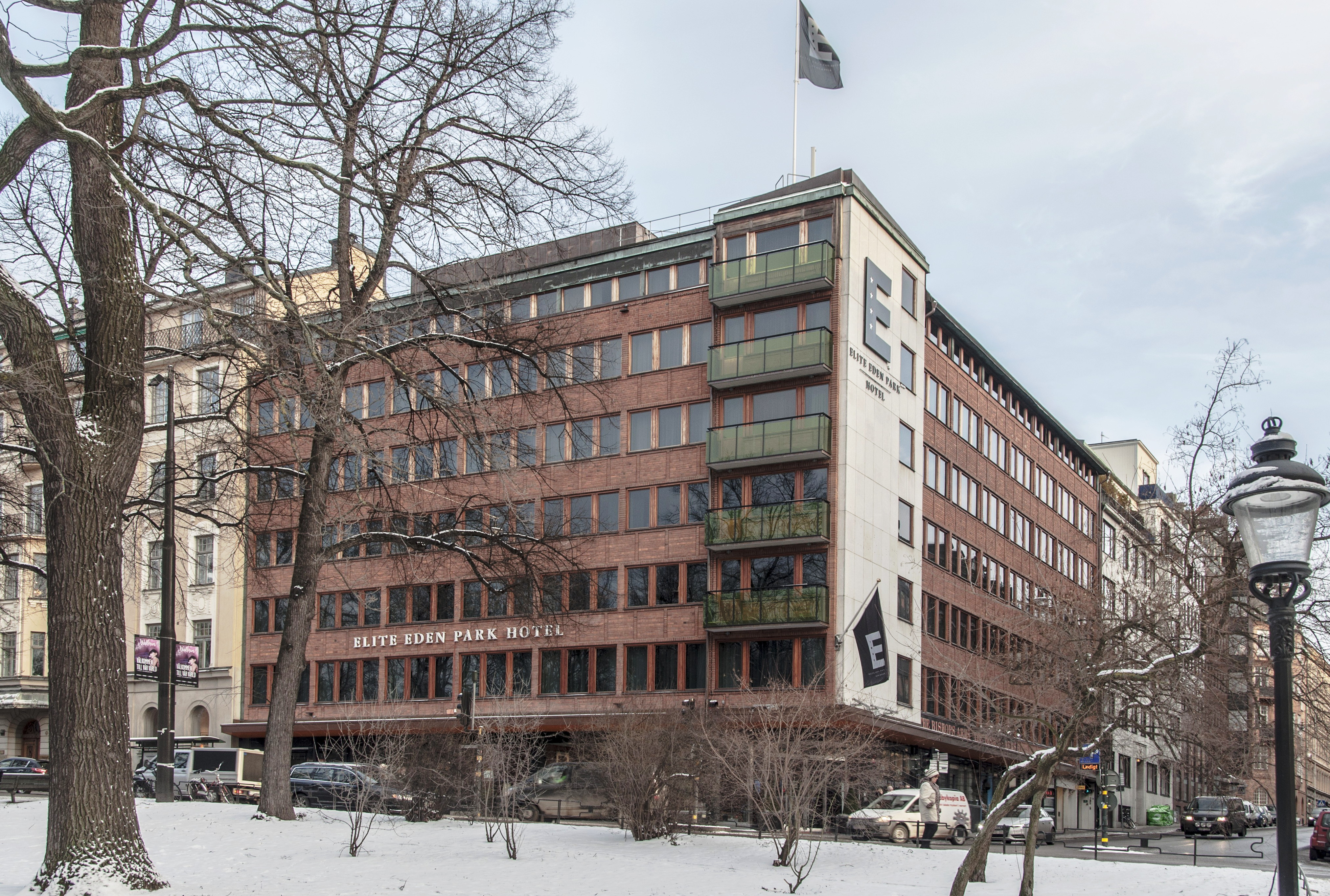 Elite Eden Park Hotel, Stockholm. Ursprungligen Bolidens huvudkontor Rotundan 3, Linnégatan 1, Sturegatan 22, Nybyggnadsår 1957 - 1959 Bolidens Gruv AB (Byggherre) E. Erlandsson (Byggmästare) S. Kjerr (Arkitekt)